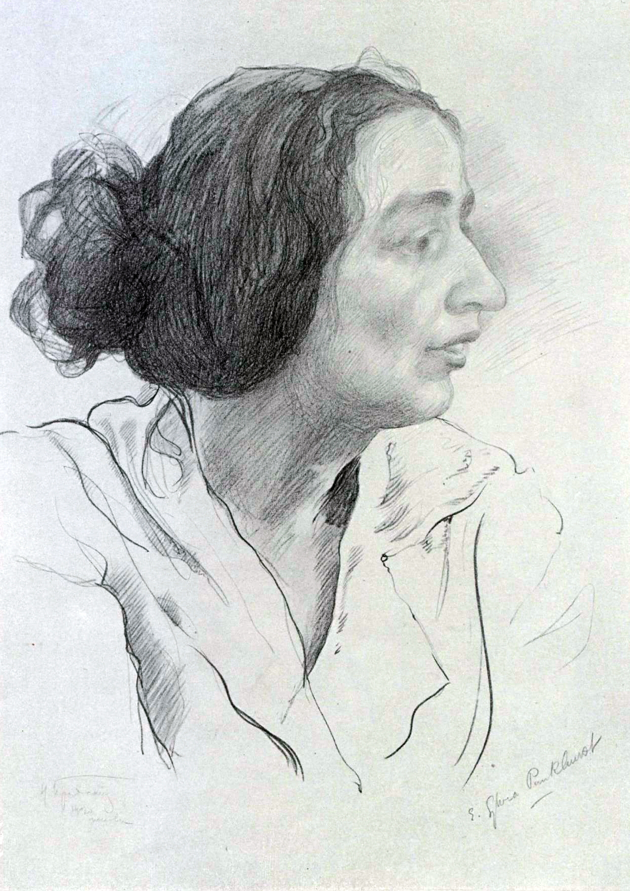 Панкхёрст, Сильвия Эстелла